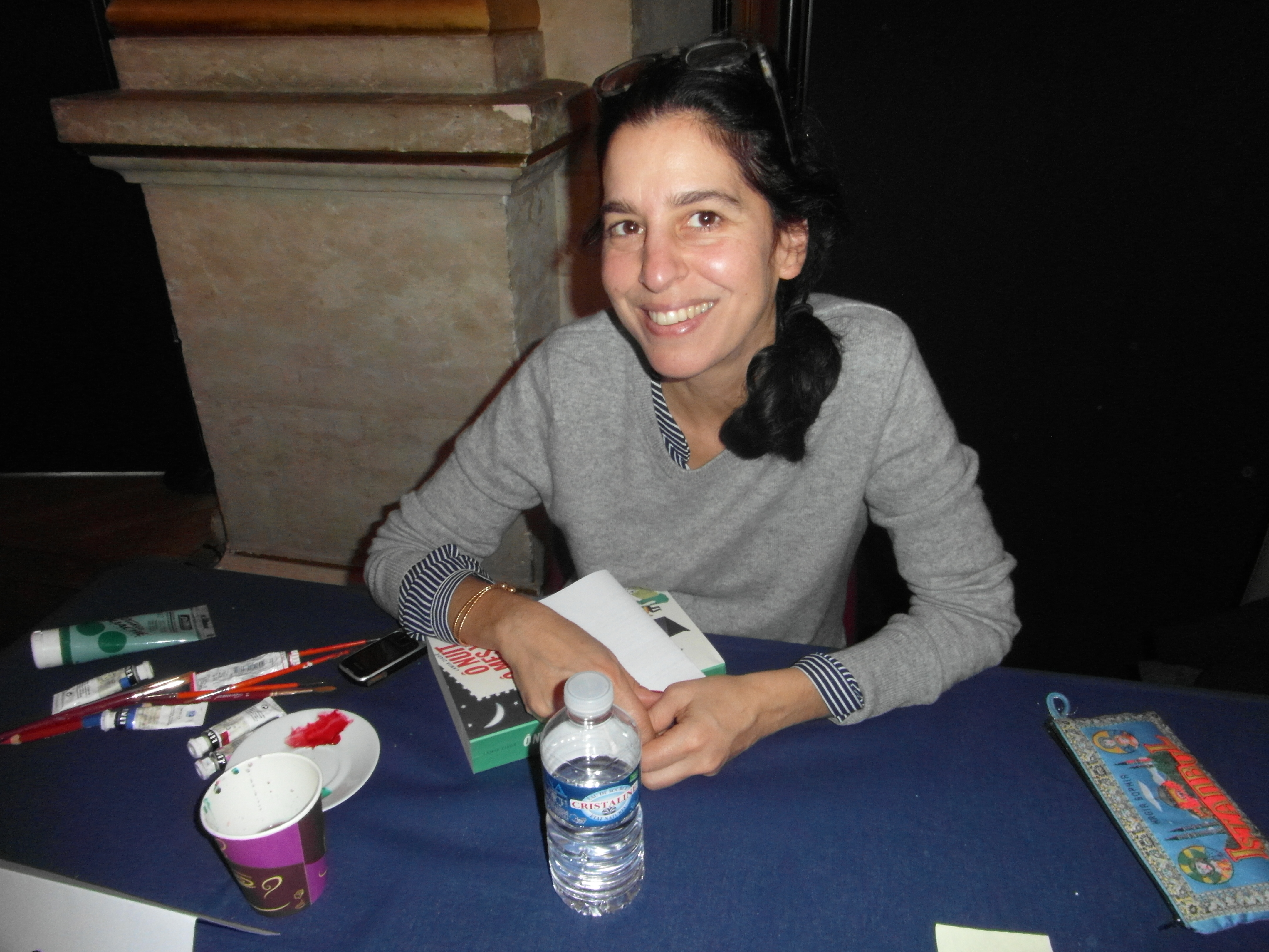 22e Maghreb des Livres, 13 et 14 février 2016